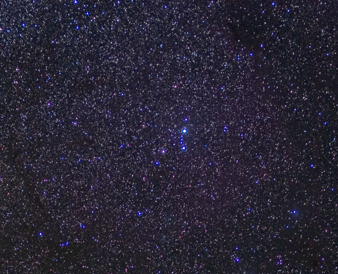 Lambda Orionis detail